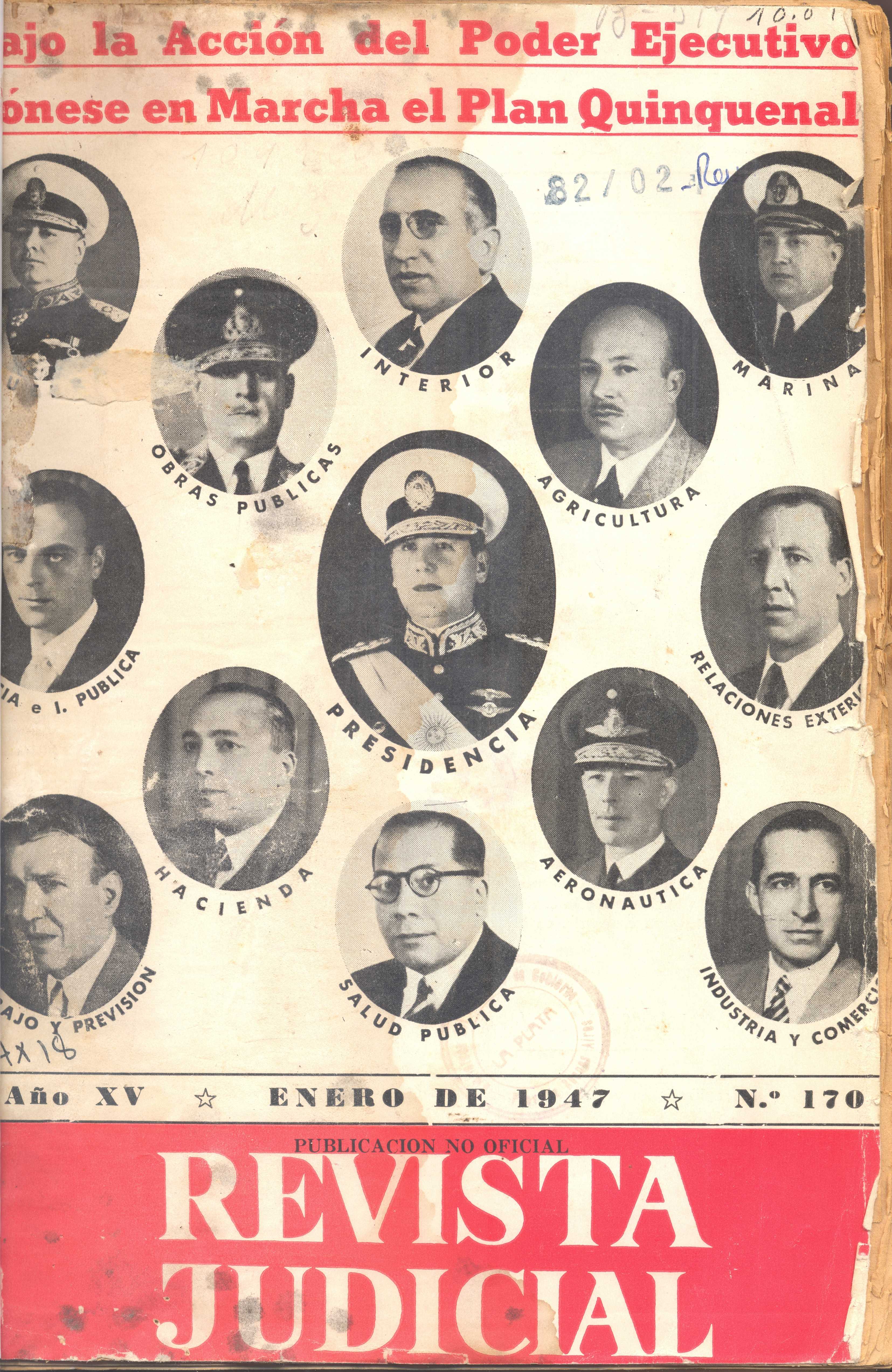 Revista Judicial nº 147: "Bajo la acción del Poder Ejecutivo pónese en Marcha el Plan Quinquenal".